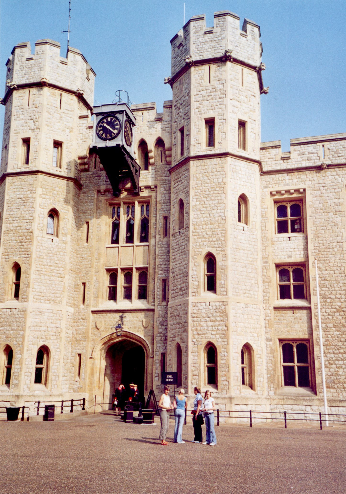 Der Waterloo Block des Tower von London, in dem die Britischen Kronjuwelen aufbewahrt werden.